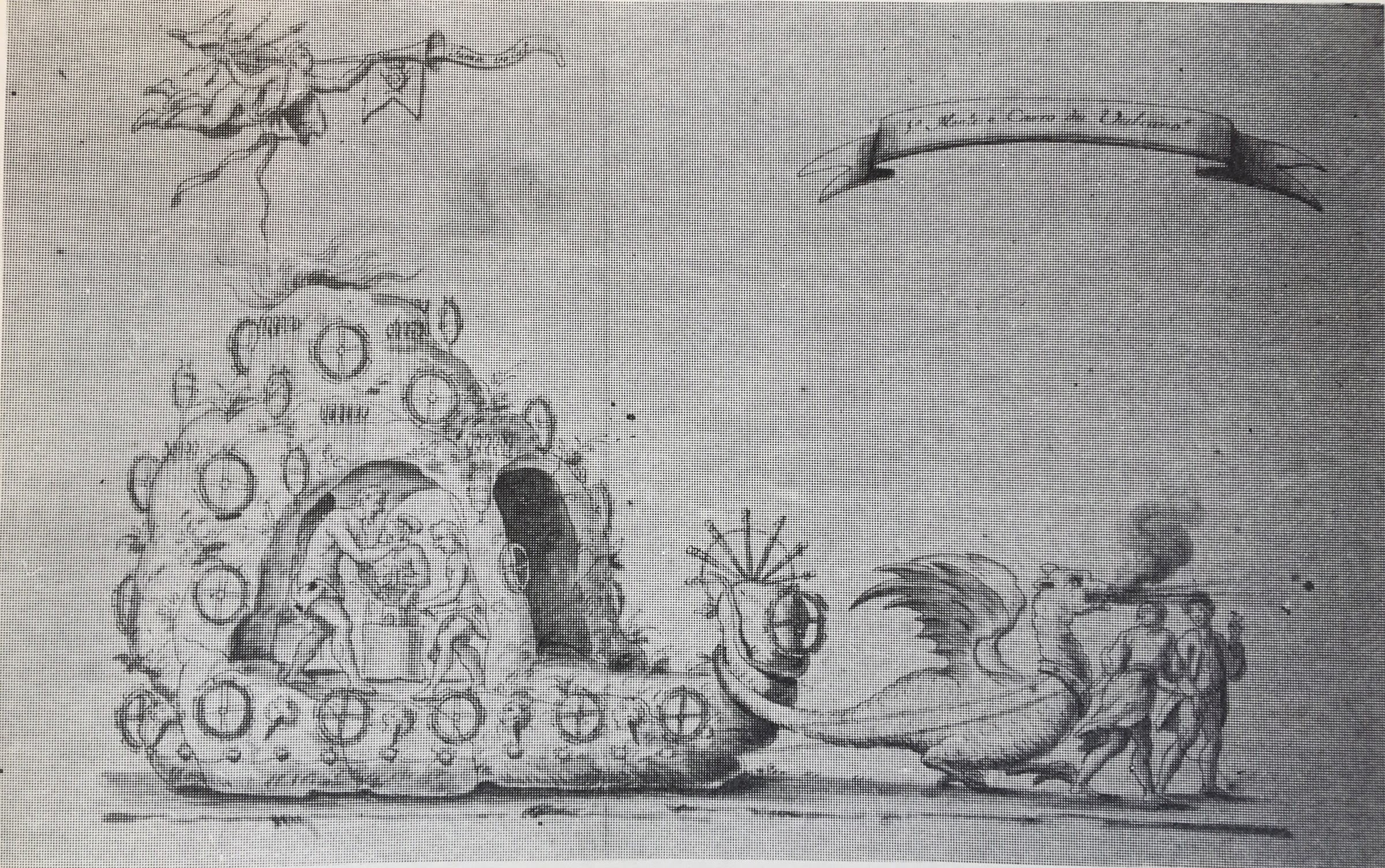 Desenho por Antônio Francisco Soares do carro alegórico "de Vulcano" de Soares de 1786 para as festividades locais comemorativas do casamento dos Infantes de Portugal.